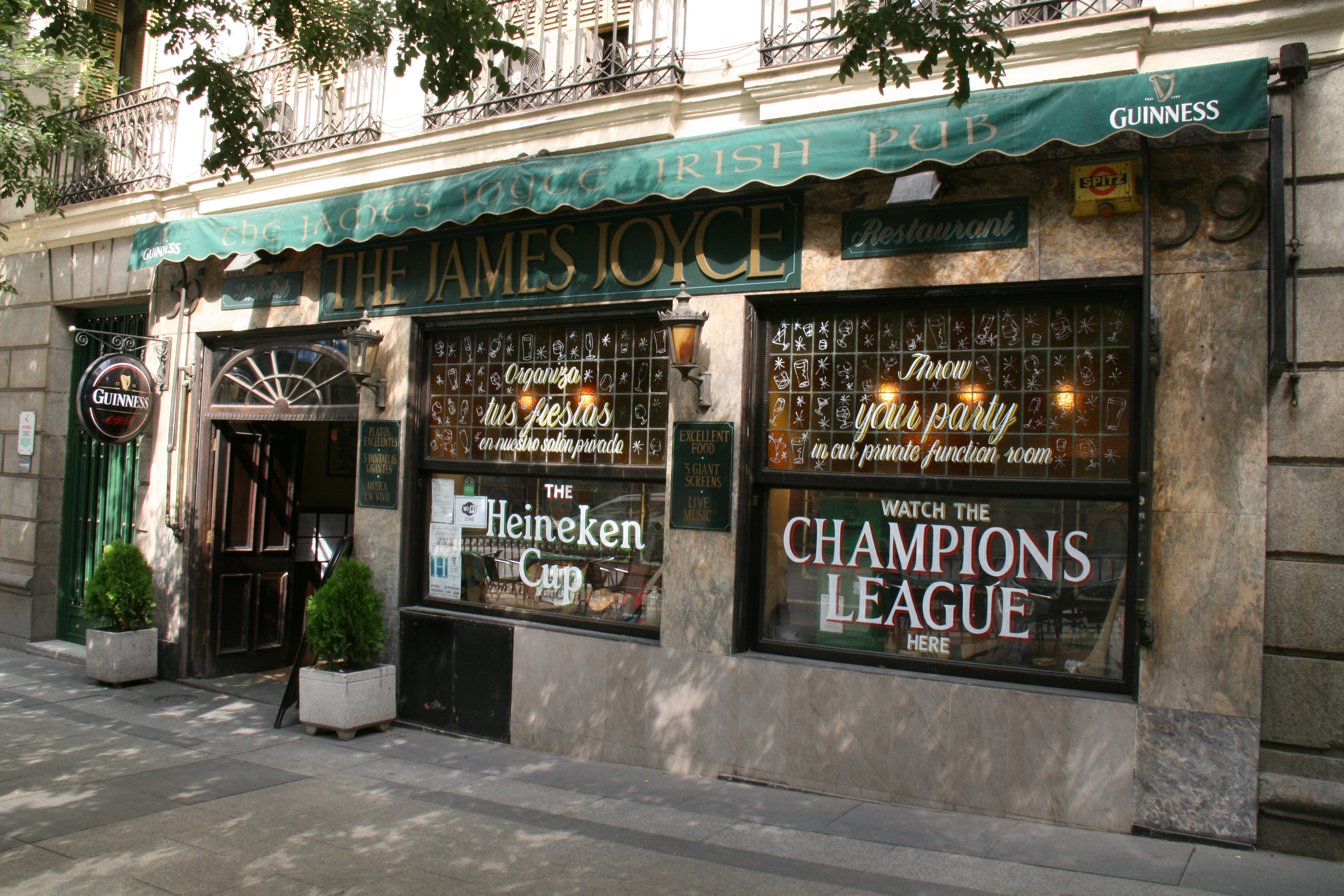 Lugar donde se encontraba el antiguo café Lyon